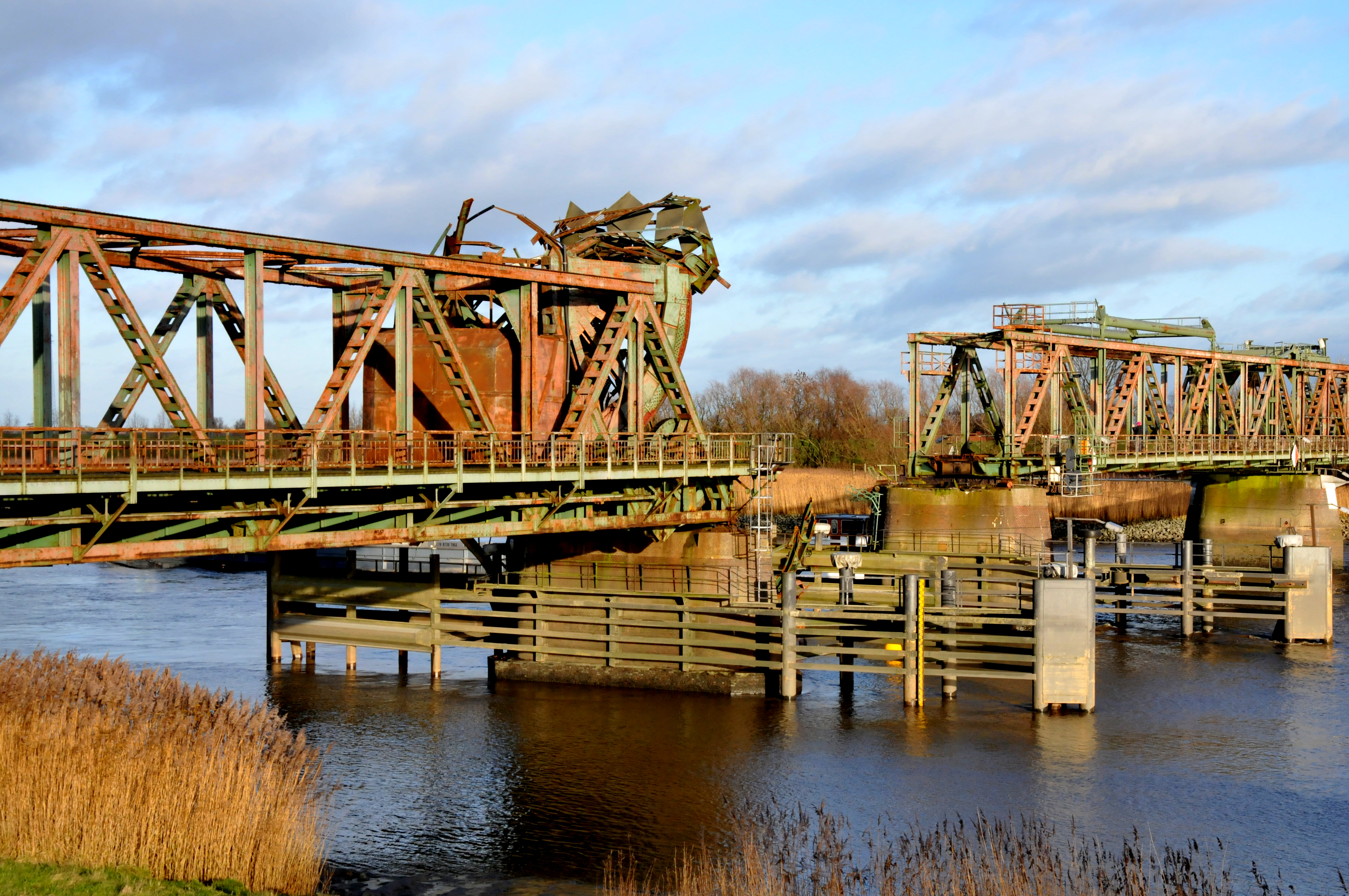 De Friesenbrücke bij Weener werd in de avond van 3 december 2015 geramd door een vrachtschip Emsmoon, varende onder de vlag van Antigua en Barbuda, waardoor de brug voor onbepaalde tijd gesloten is voor al het verkeer. Er is waarschijnlijk vijf jaar lang geen treinverkeer tussen Bad Nieuweschans en Leer mogelijk, omdat de brug ingestort is. De brug moet volledig vervangen worden omdat deze niet meer gerepareerd kan worden.